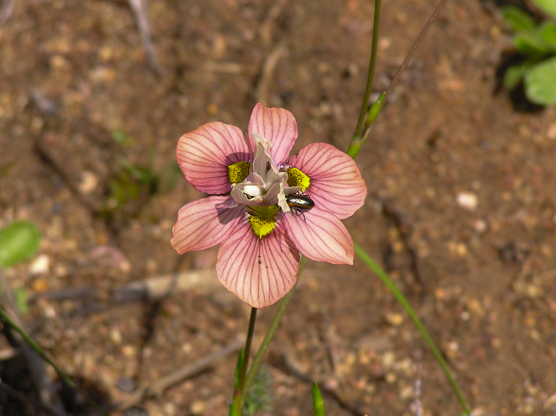 Moraea tricolor Andrews, ein Schwertliliengewächs aus der Capensis. Tienie Versfeld Wildflower Reserve, Gemeinde Swartland, Distrikt Westküste, Provinz Westkap in Südafrika